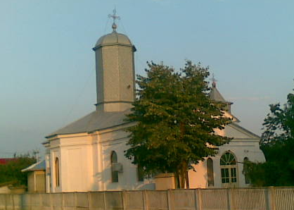 Biserica Sfântu Gheorge din Peretu, Teleorman, România